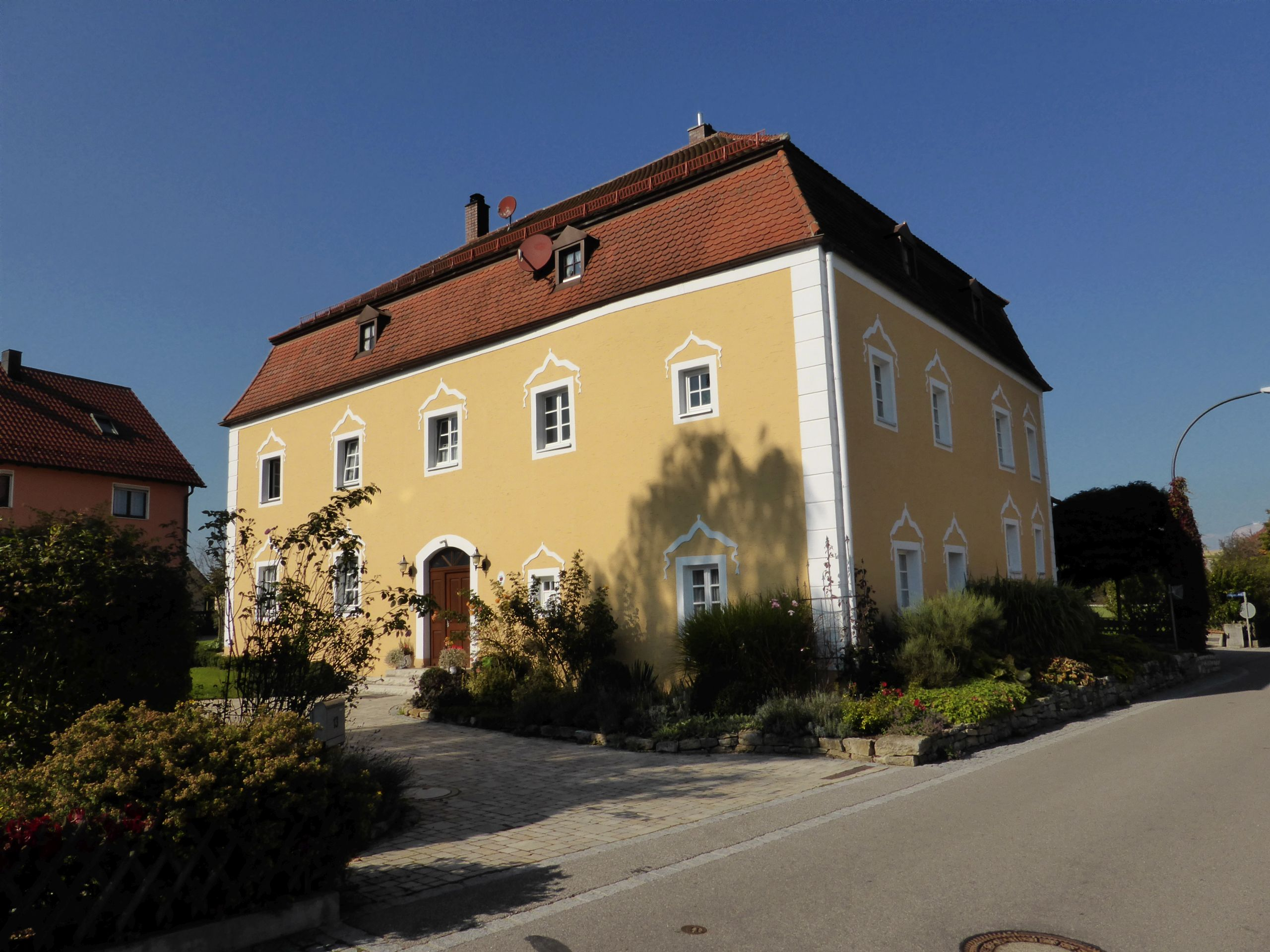 Hofmarksschloss Wischenhofen